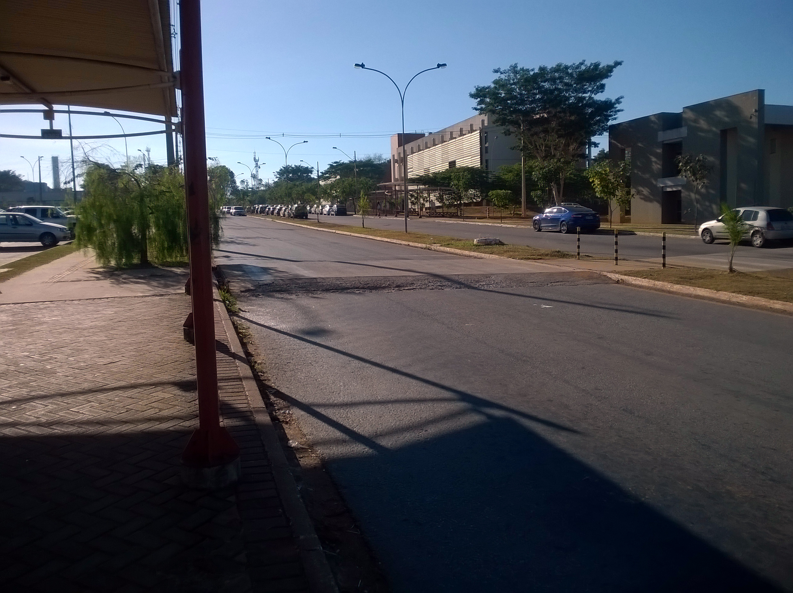 Alameda Palmeiras, no campus Samambaia da UFG, em junho de 2016.